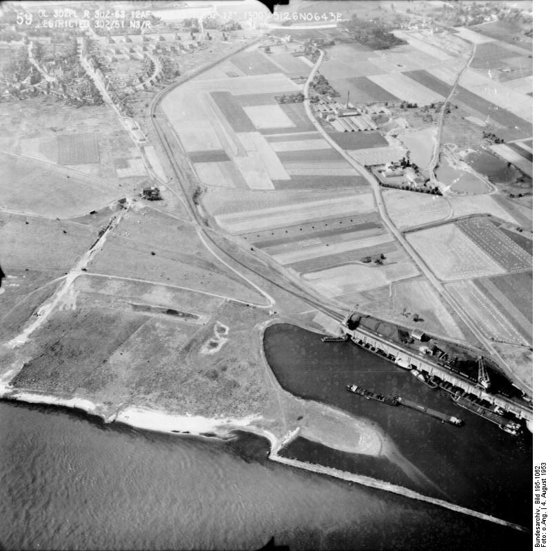 Rheinbefliegung der Alliierten 1953